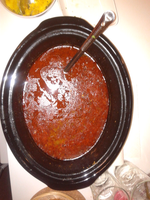 मिसळ रस्सा